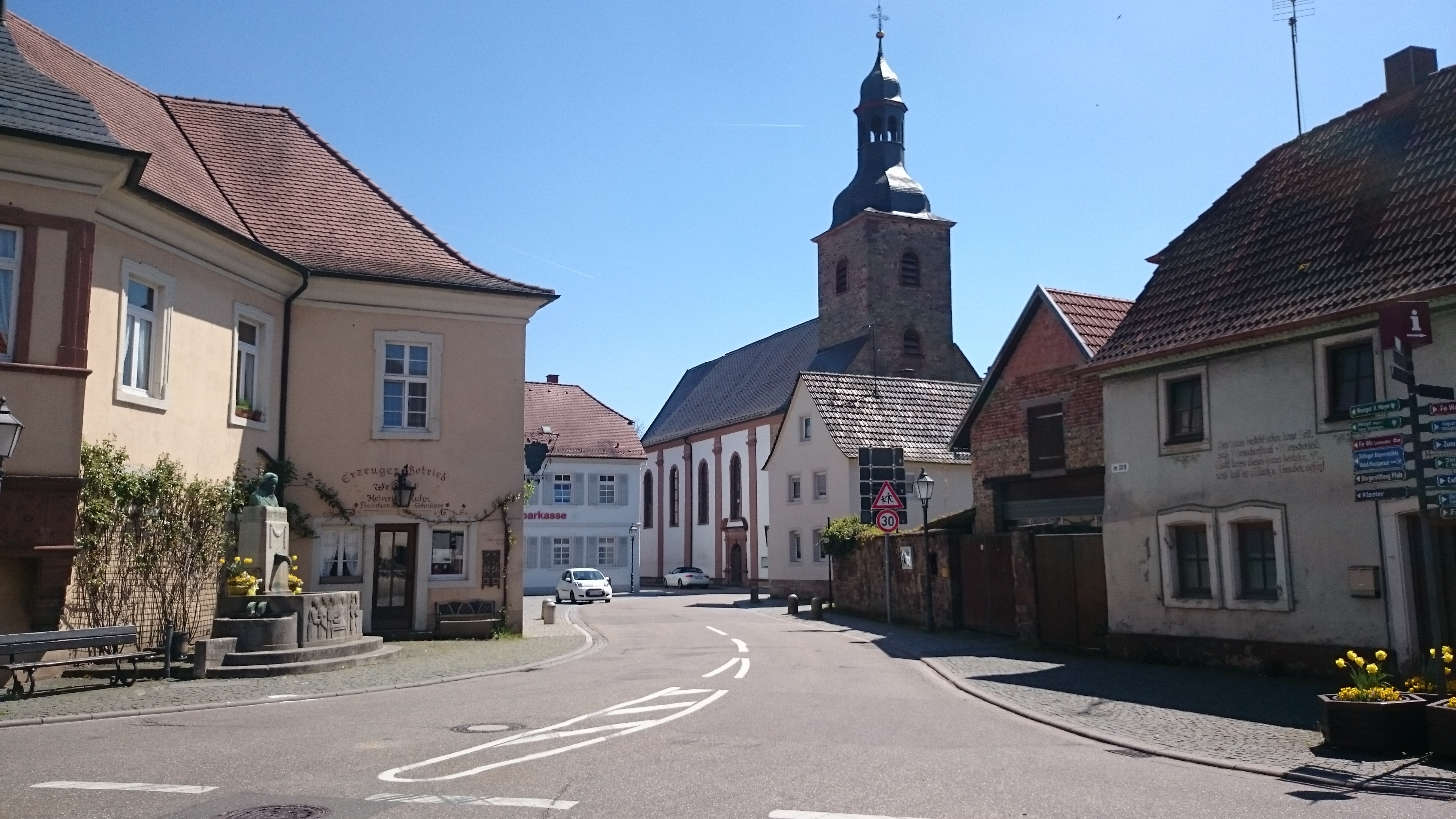 Klingenmünster Stadtkern